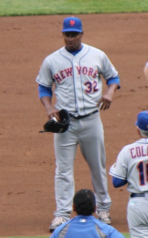 Jenrry Mejía